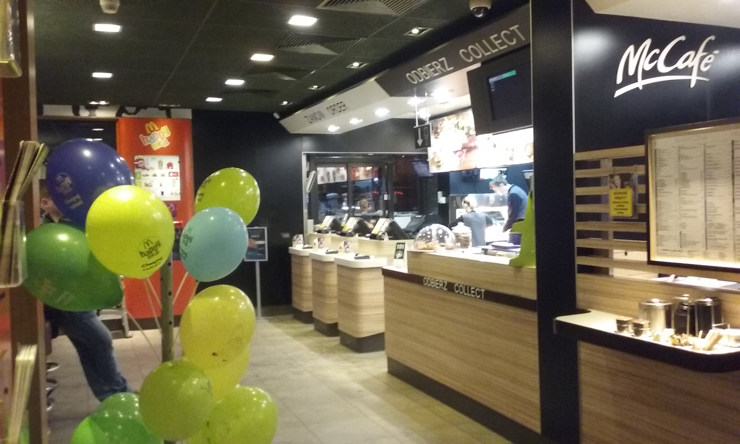 Wewnątrz restauracji Mc'Donalds w Tomaszowie Mazowieckim (woj.łódzkie), przy trasie S8, 80 km od Warszawy, 50 km od Łodzi